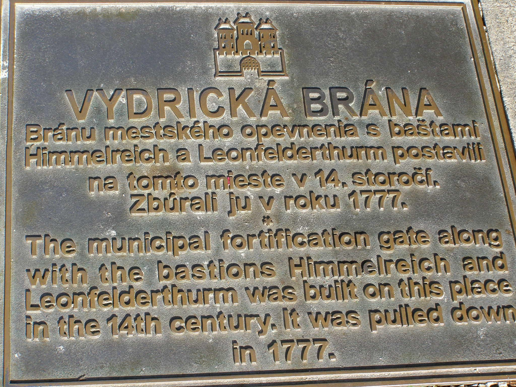 Informačná tabuľa na chodníku o existencii Vydrickej brány